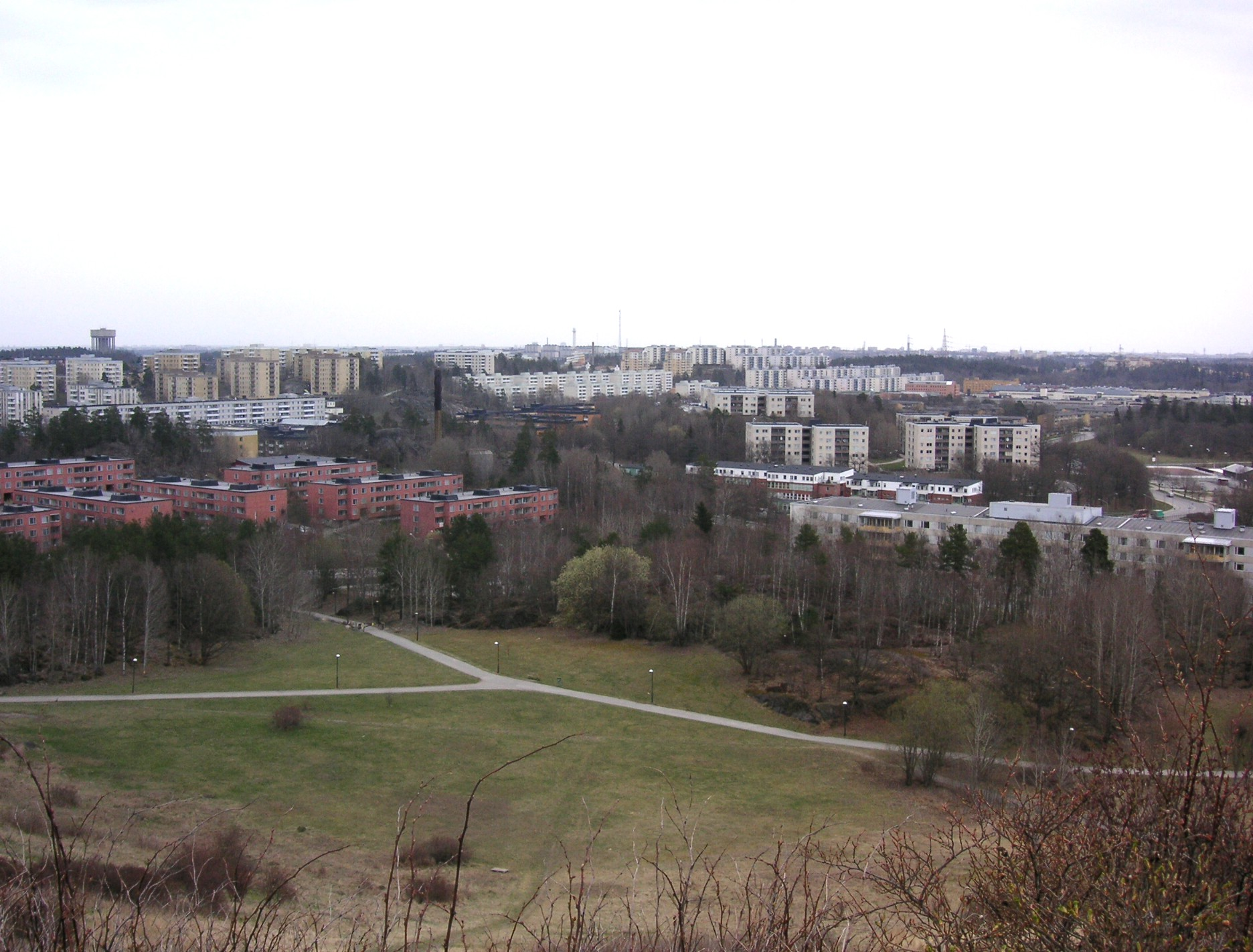 Vy not nord-ost från Vårbergstoppen i Vårberg i Stockholm